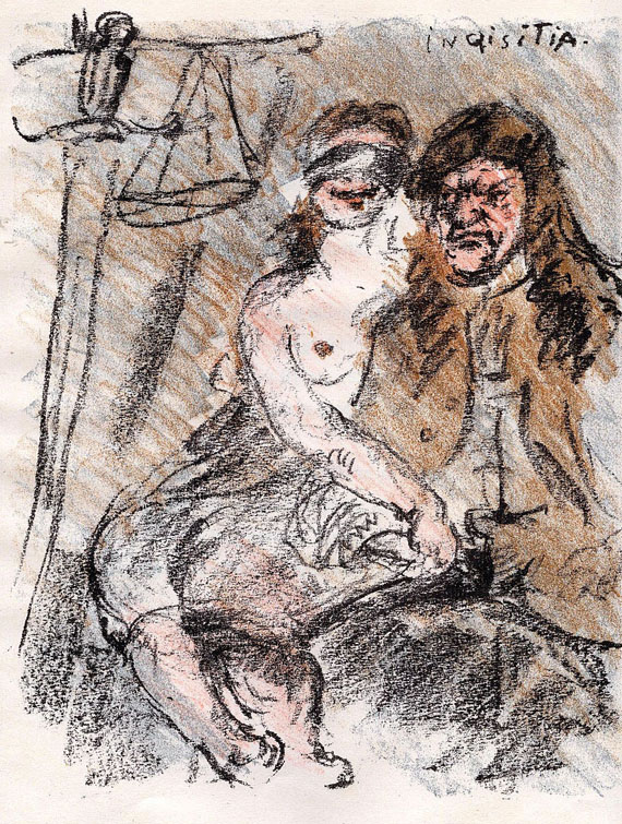 Illustration from Friedrich Schiller: Der Venuswagen (1781). 1919.